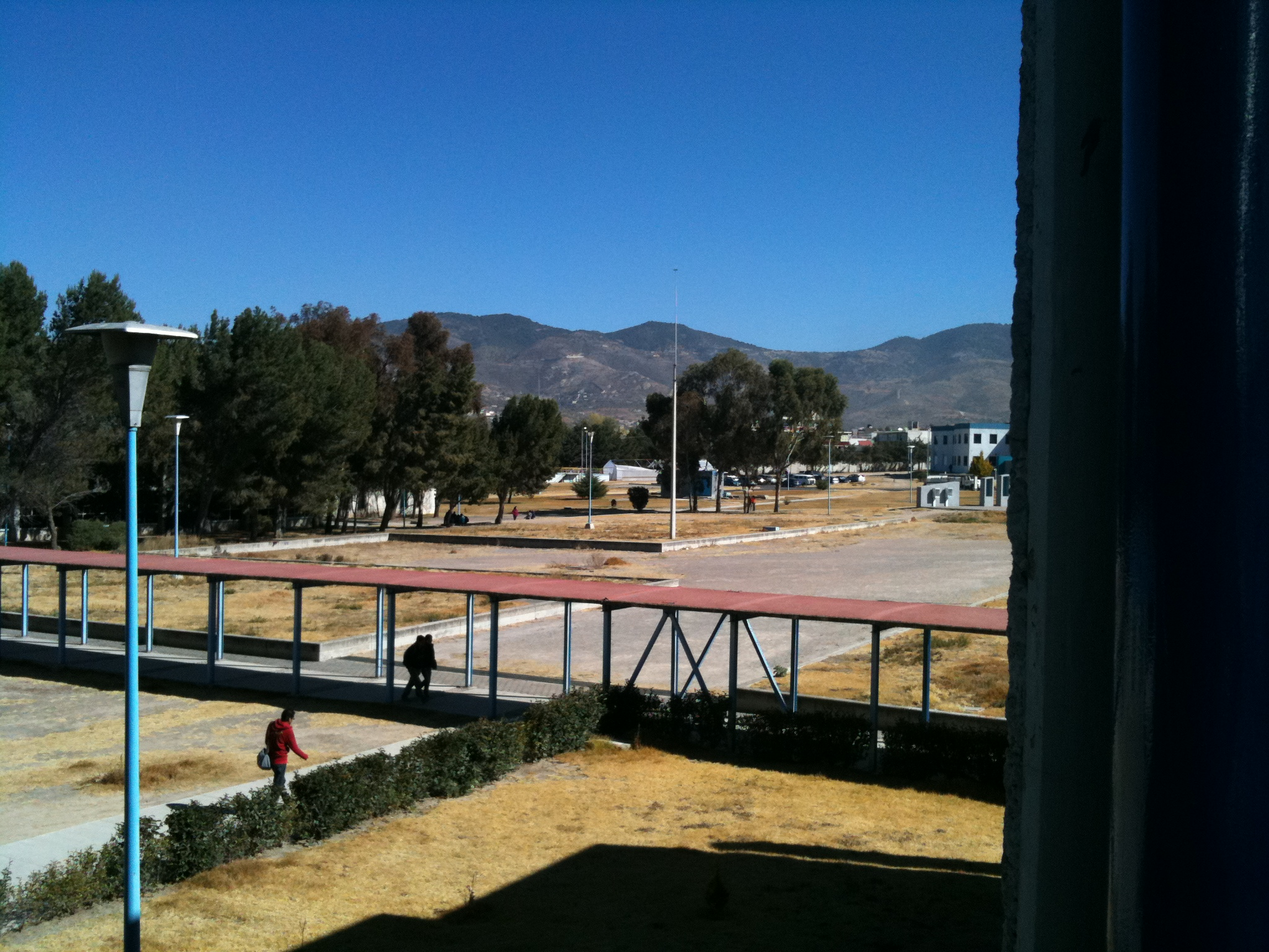 Cayó una helada en la ciudad airosa (Pachuca) y tuvimos 3 grados bajo cero, el campus amaneció universitario amaneció vacío.